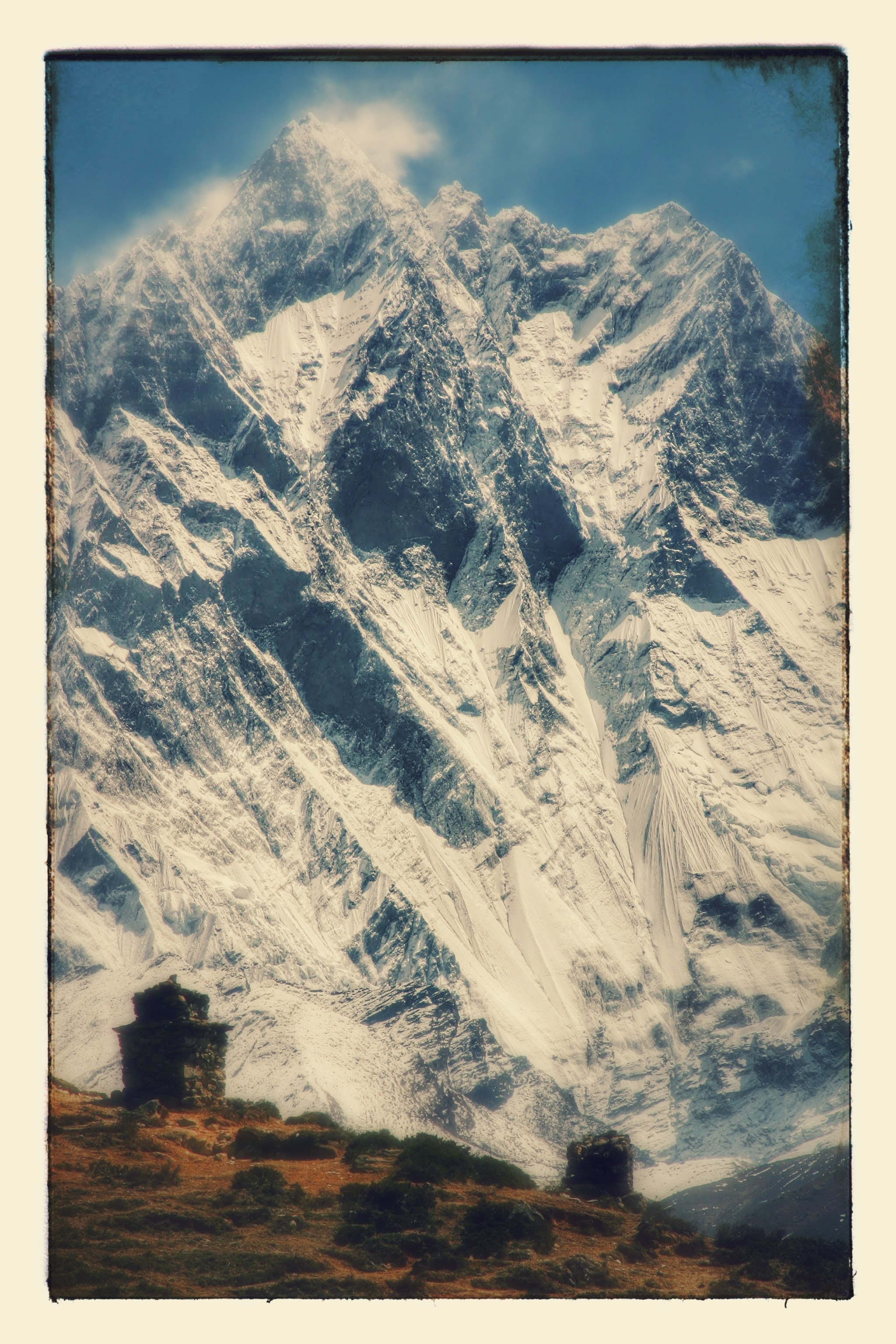 Mur du Lhotse, effet graphique